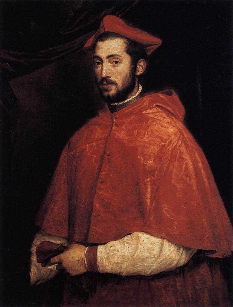 Cardinal Alessandro Farneselabel QS:Lit,"Ritratto del cardinale Alessandro Farnese"